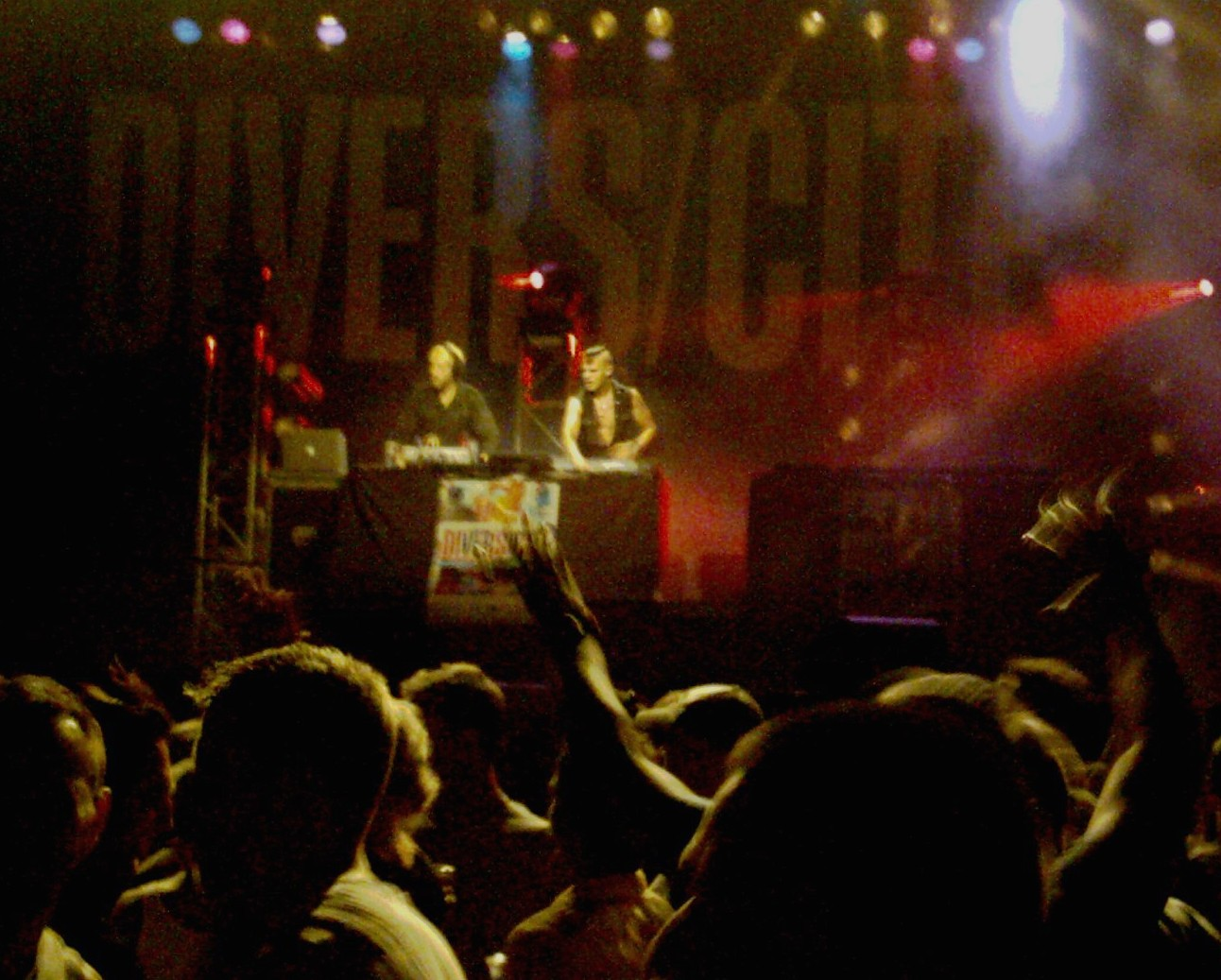 Performance de musique techno dans le Parc Émilie-Gamelin à Montréal dans le cadre du festival Divers/Cité